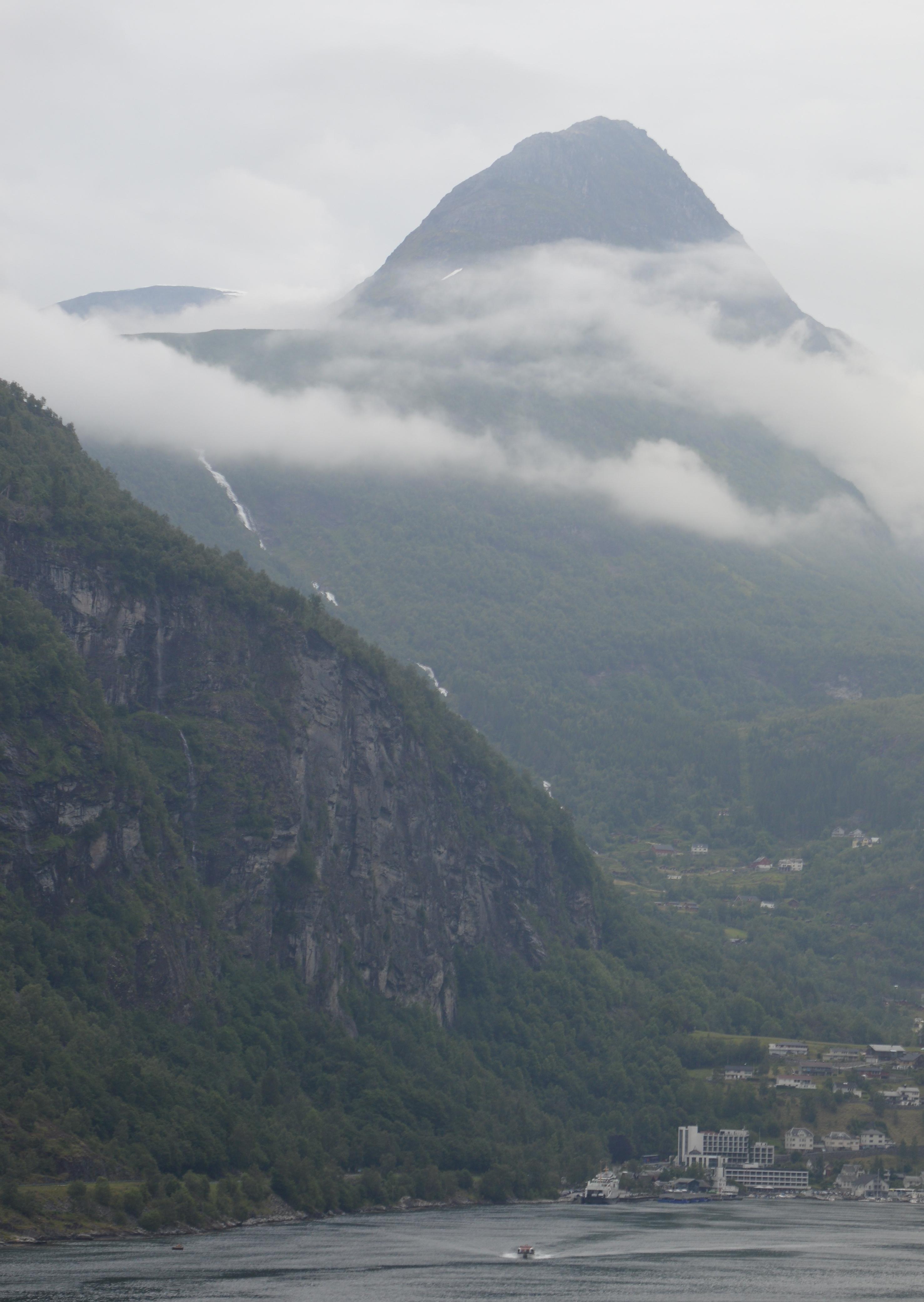 Ende des Geirangerfjords mit Grinddalsfossen